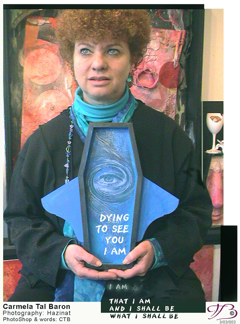 כרמלה טל ברון